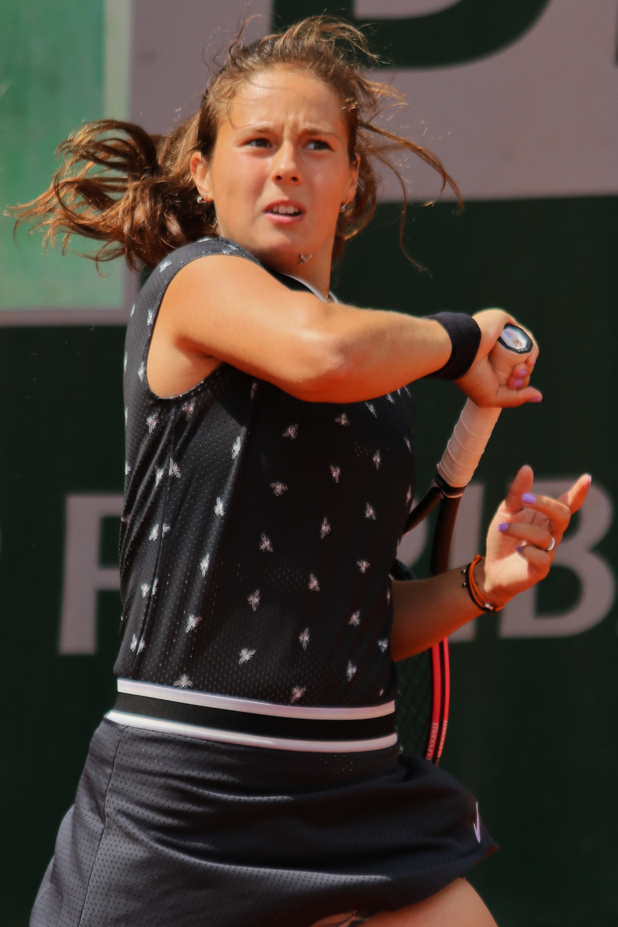 Kasatkina RG19 (7)